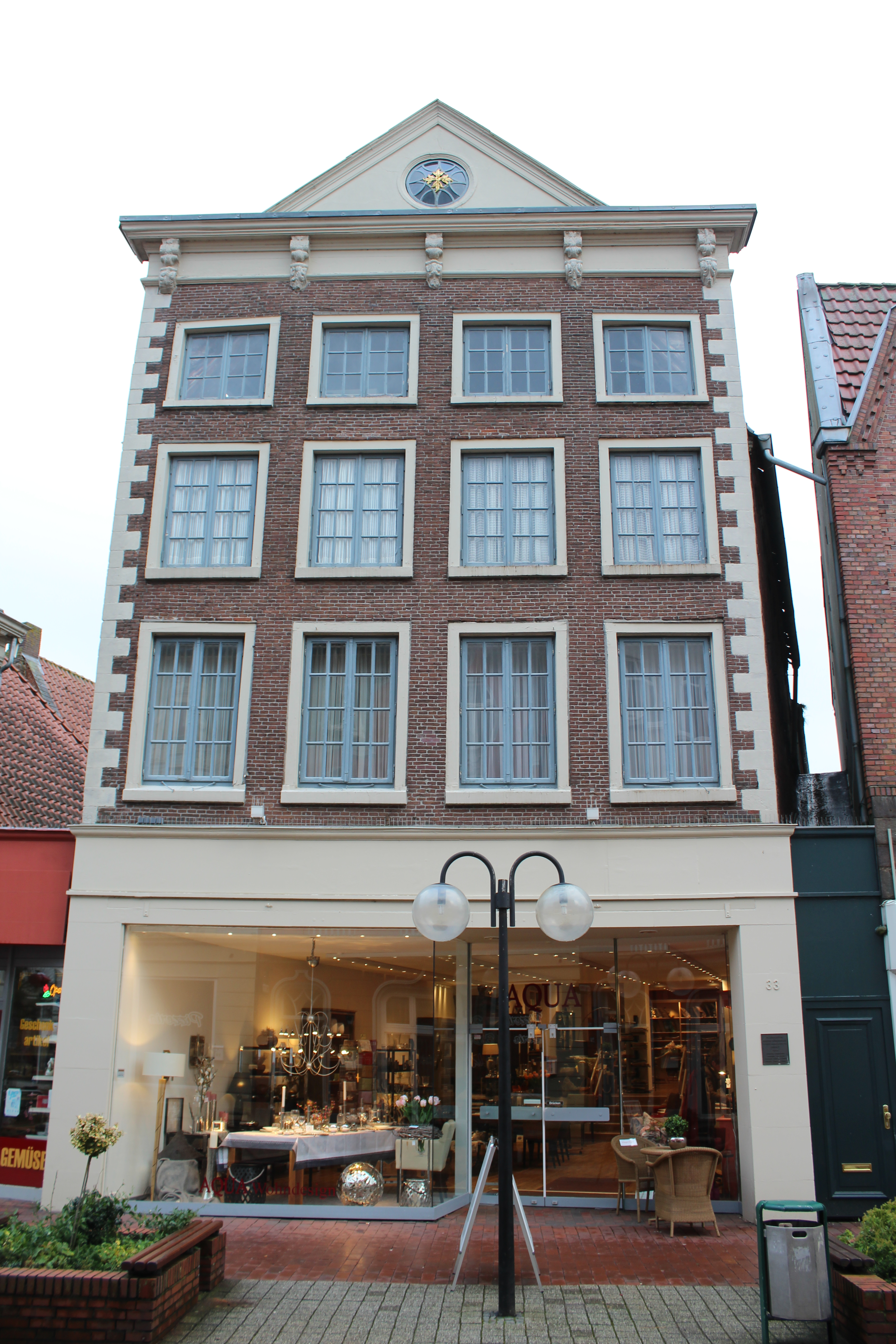 Mühlenstraße 33, Leer (Ostfriesland), Niedersachsen, Deutschland